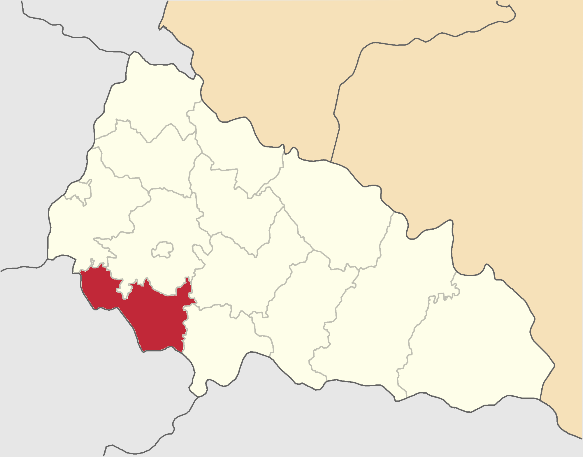 Beregovskyi-Raion map